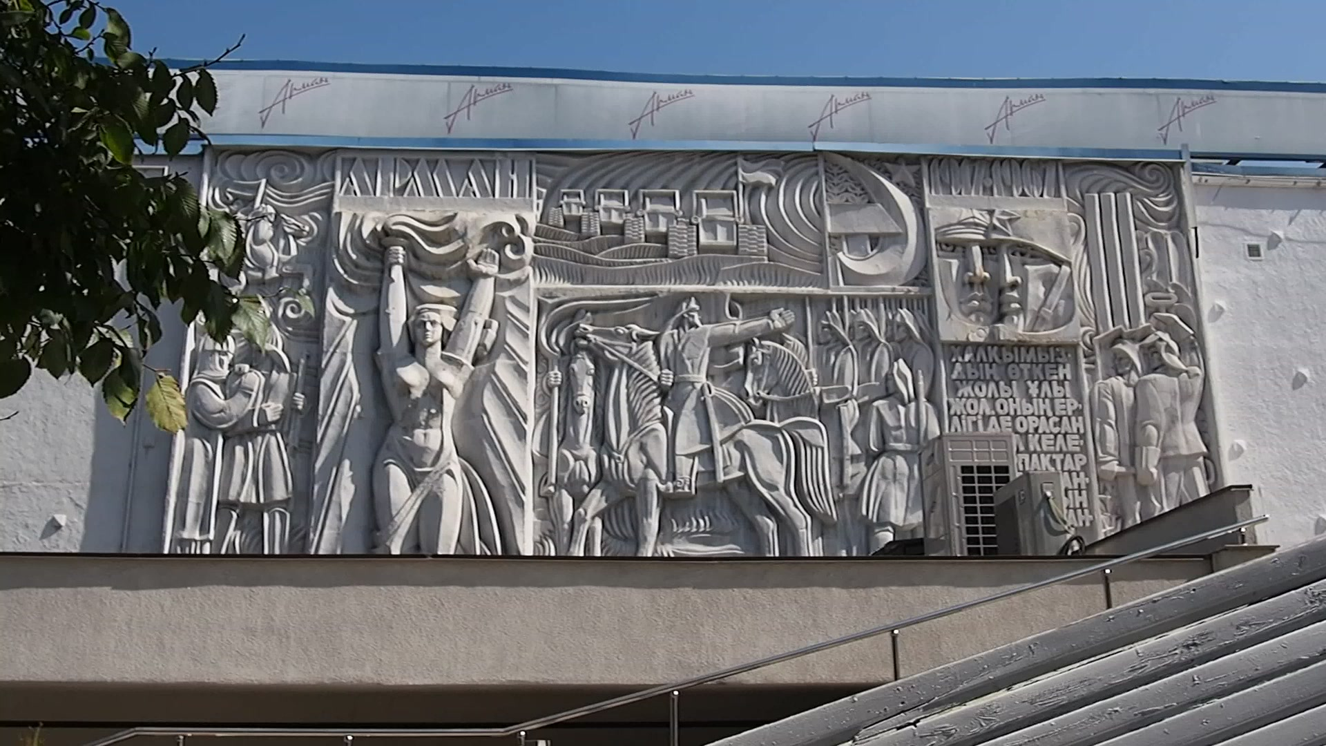 P9190561 02